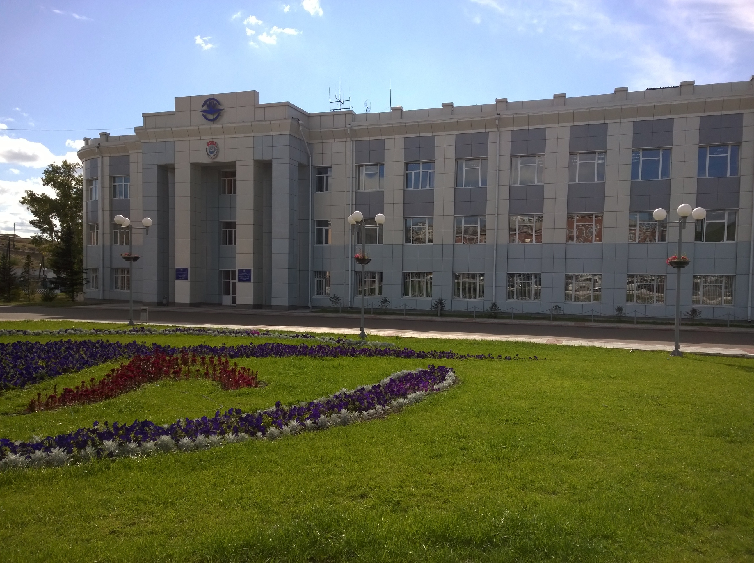 Административный корпус АО "У-УАЗ"